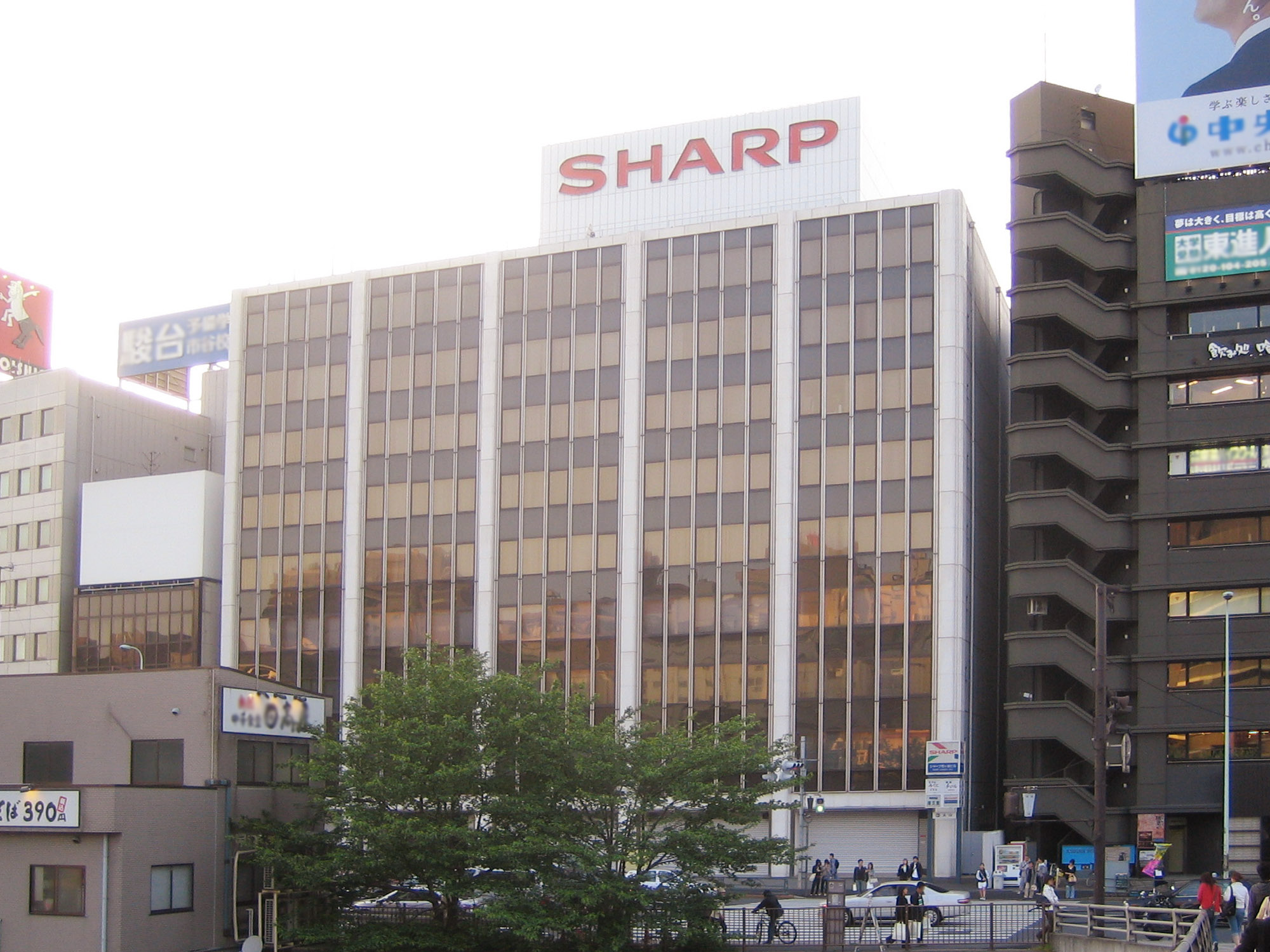 Sharp Corporation (シャープ株式会社), Tokyo Ichigaya Bldg., in Shinjuku, Tokyo, Japan